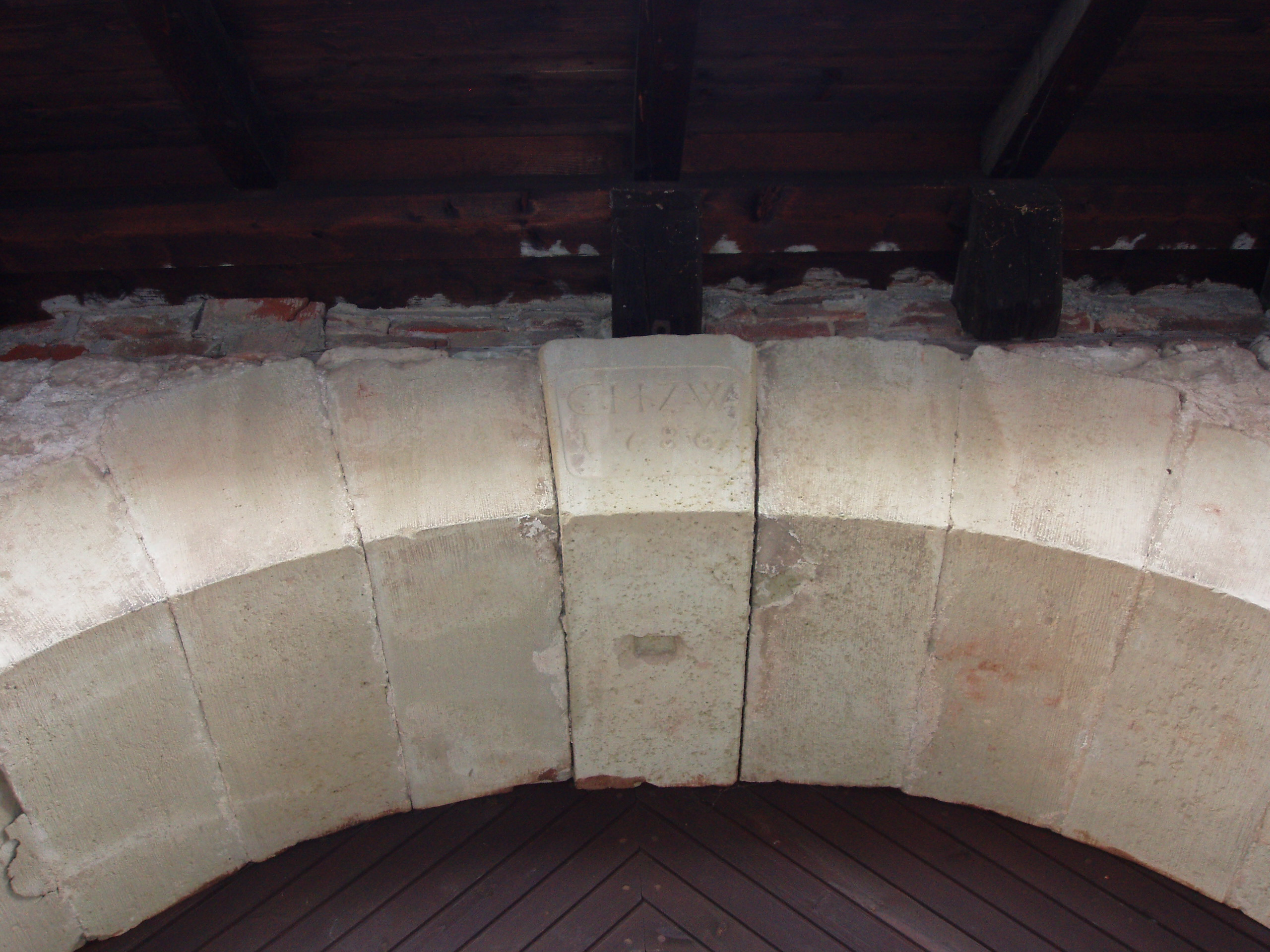 Schlussstein am Tor der Glockenkelter in Kernen im Remstal